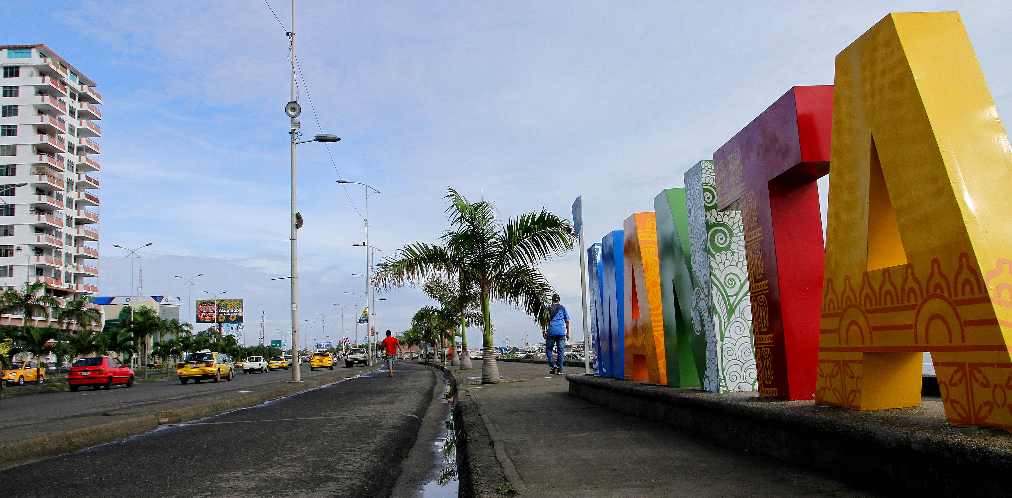 Conocida oficialmente como San Pablo de Manta, se encuentra localizada en la provincia de Manabí, asentada en una espléndida bahía, es visitada por turistas extranjeros y nacionales. Sus playas más frecuentadas son Tarqui, El Murciélago, Barbasquillo, San Lorenzo, Santa Marianita y Piedra Larga. Foto:César Muñoz/Andes